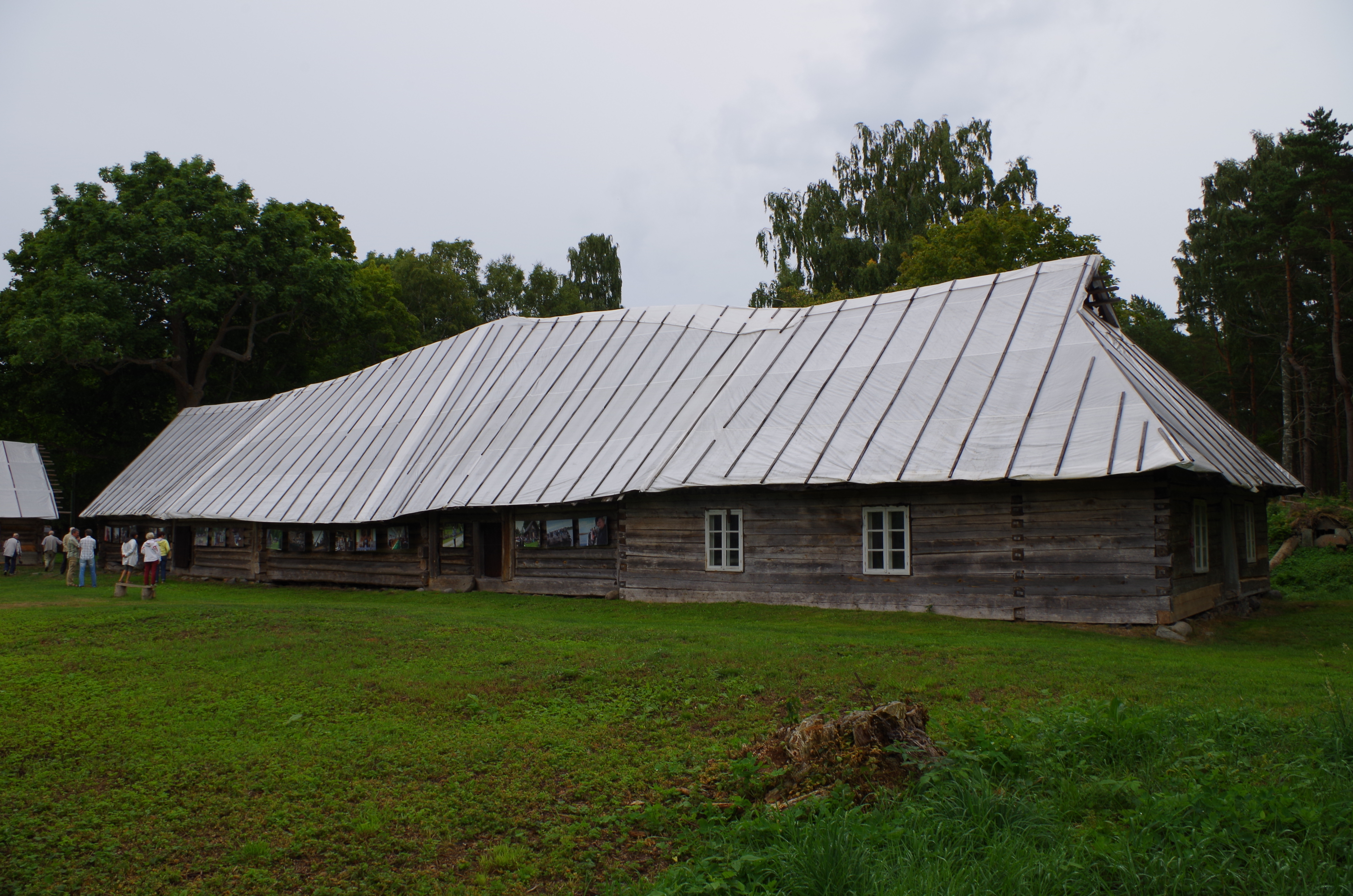 Vaade majale